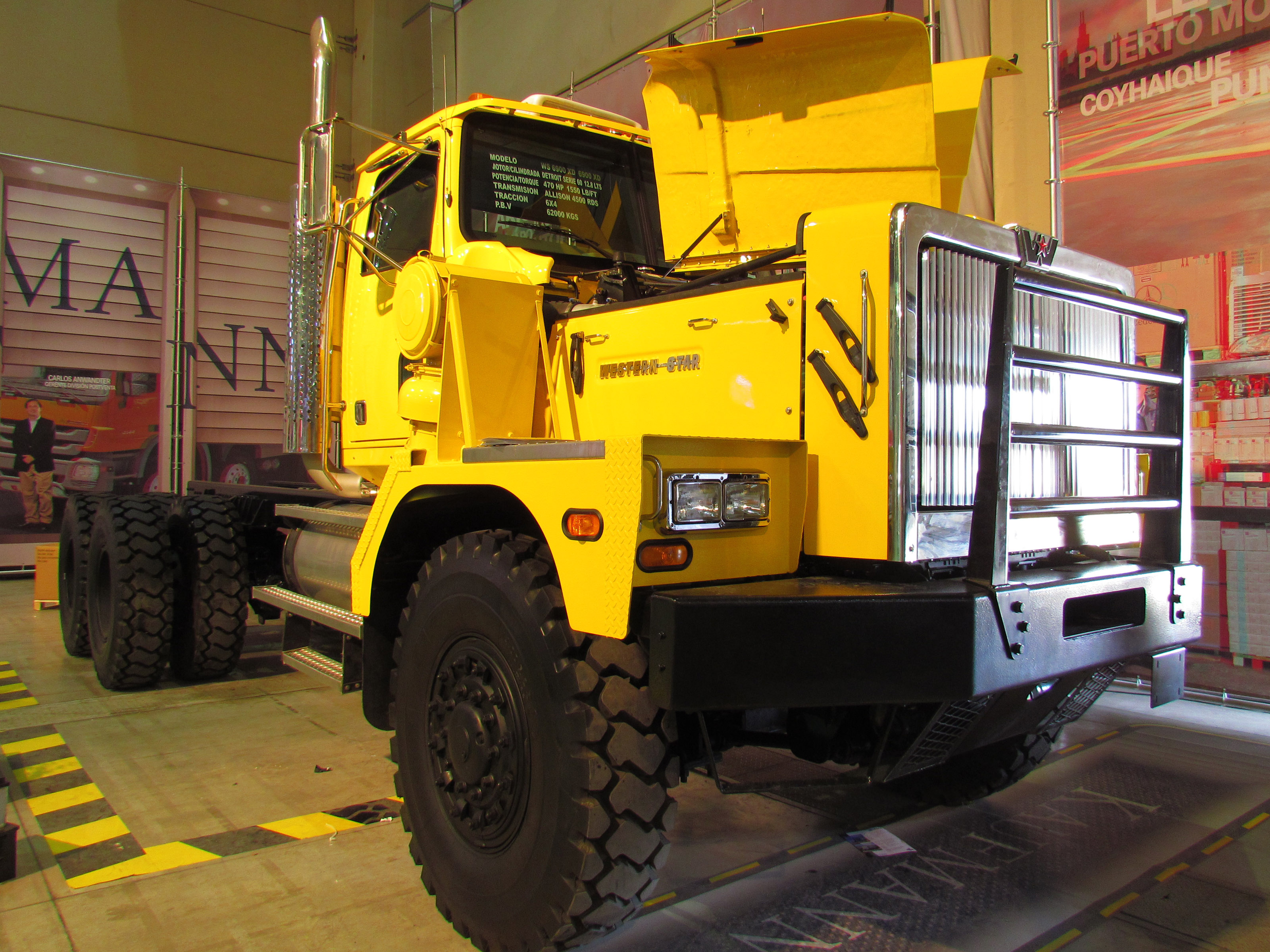 Huge!